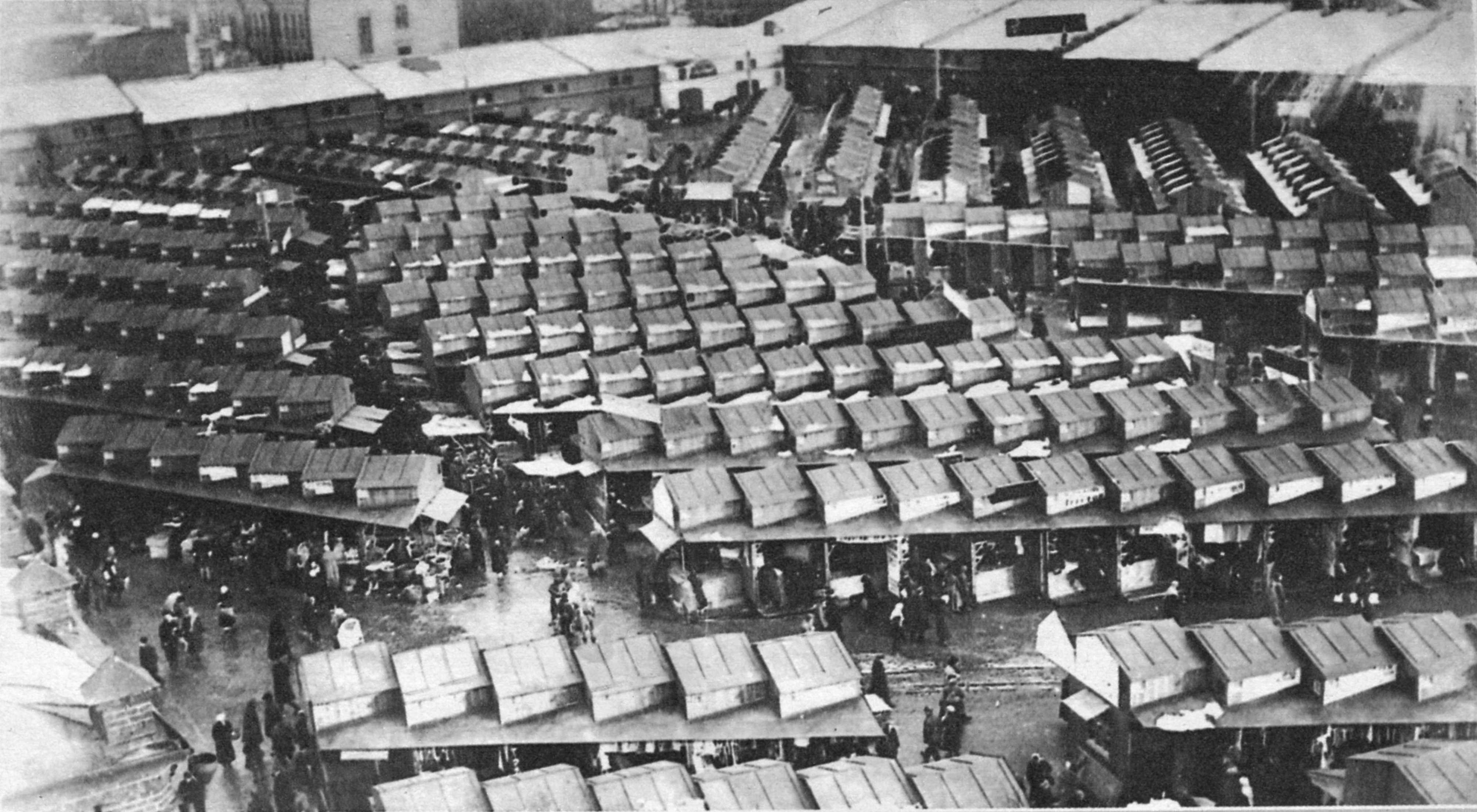 Торговые павильоны (Ново-Сухаревский рынок в Москве)